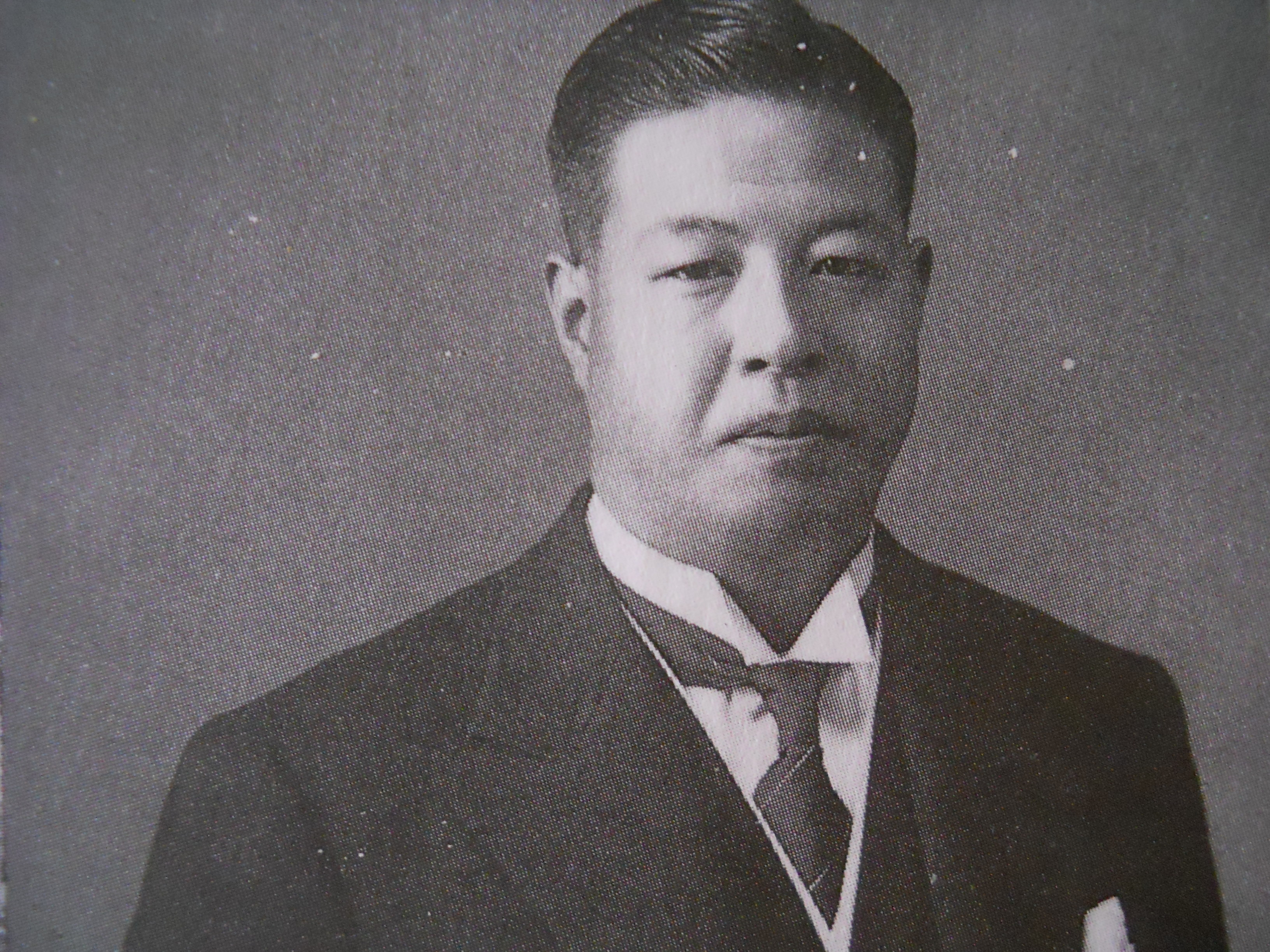 Ｎｉｄａｉ Ｓａｋａｇｕｃｈｉ Ｈｅｉｂｅｉ